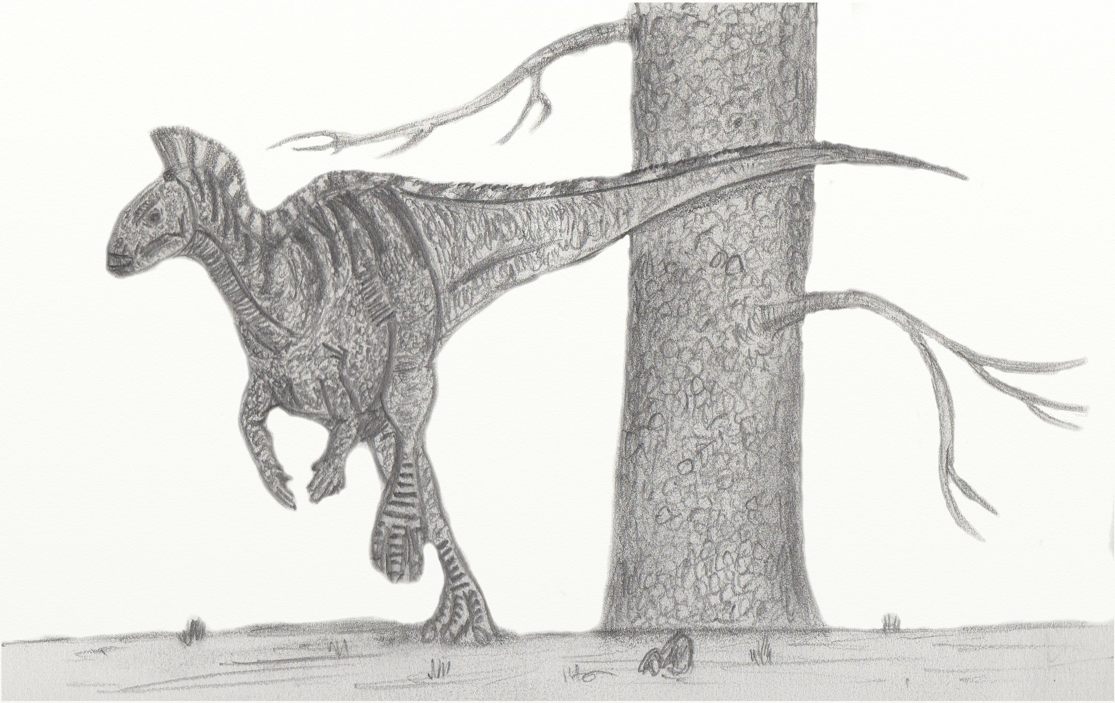 Reconstitution de Dryosaurus altus